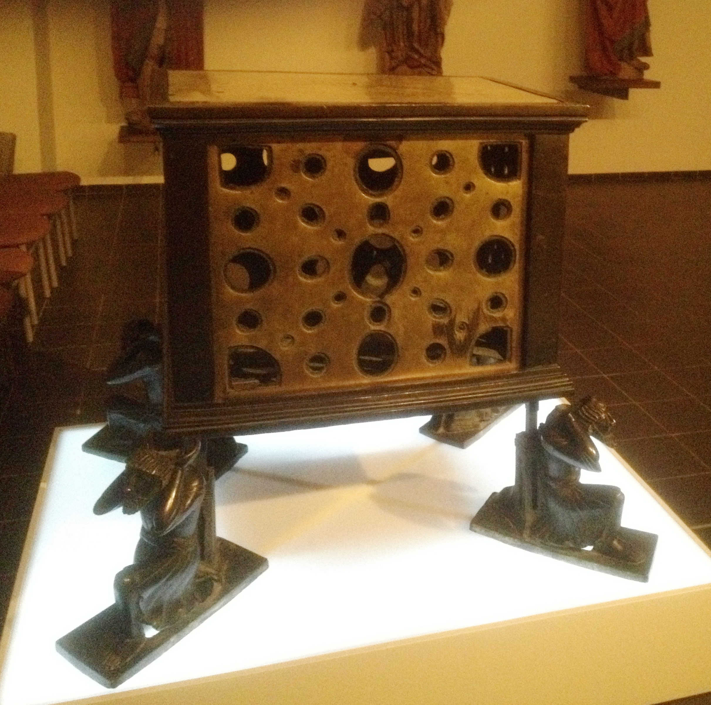 Krodoaltar